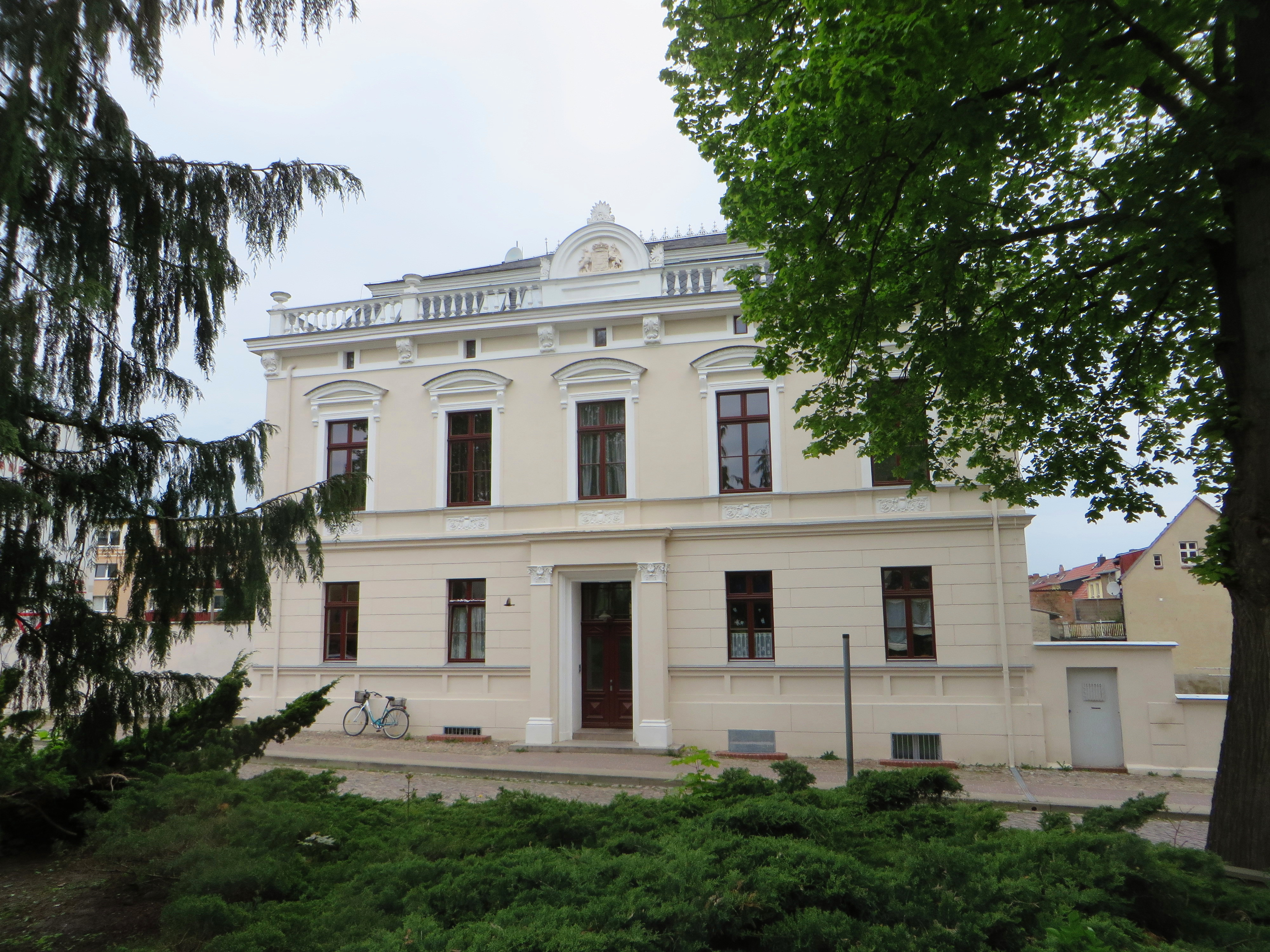 ehemaliges Amtsgericht Malchin